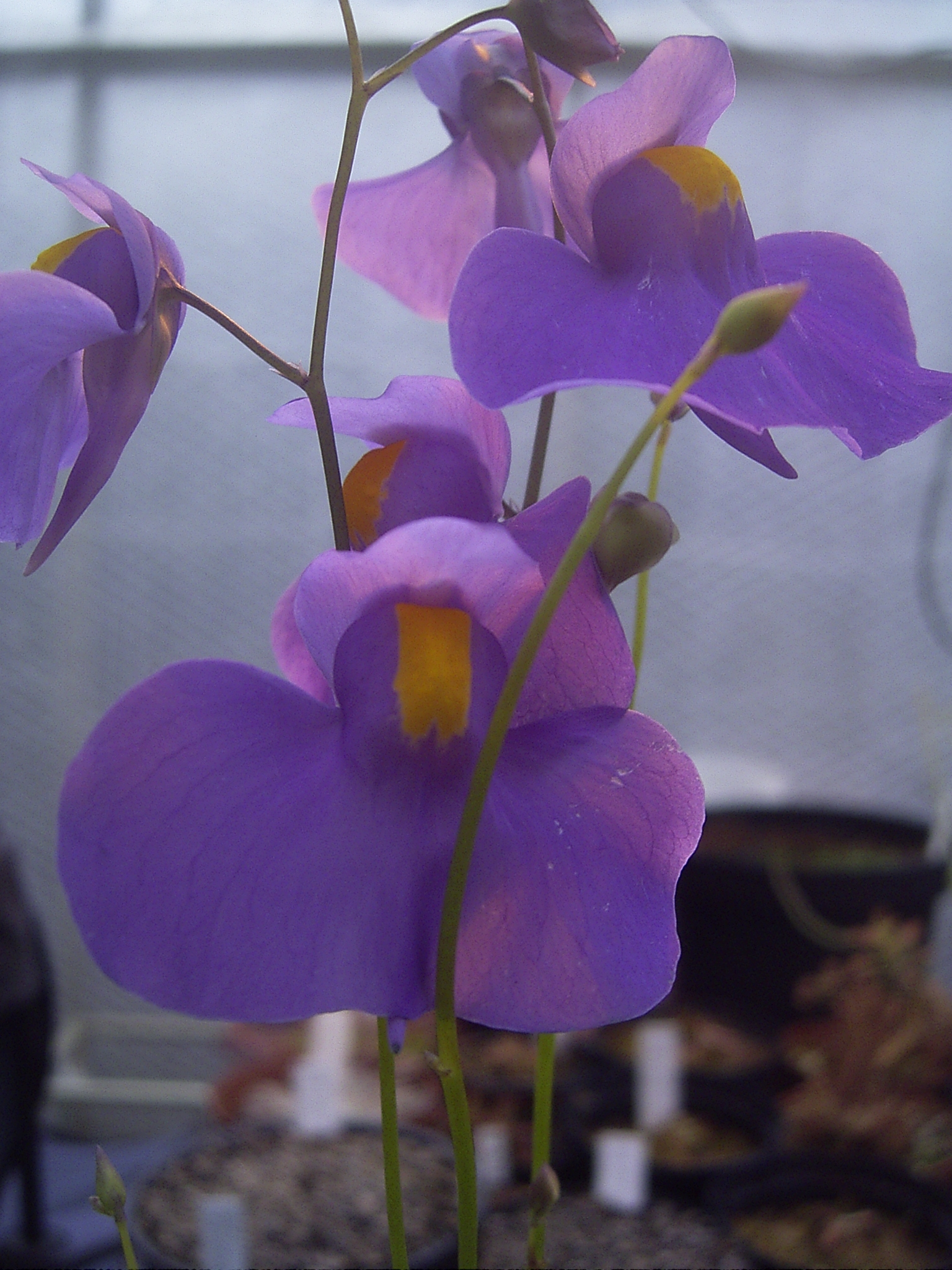 Utricularia longifolia inflorescence